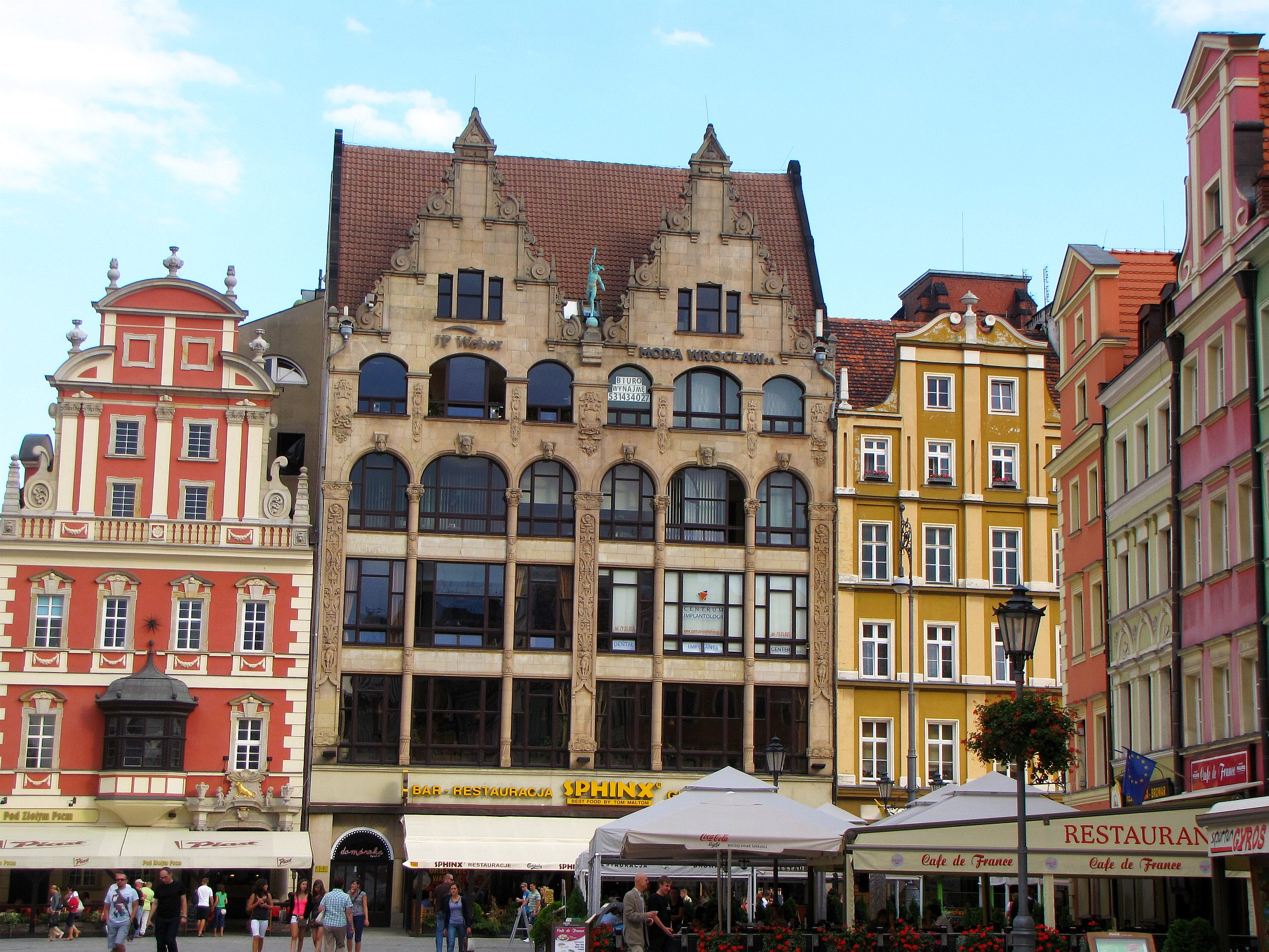 Wrocław, Rynek 39/40